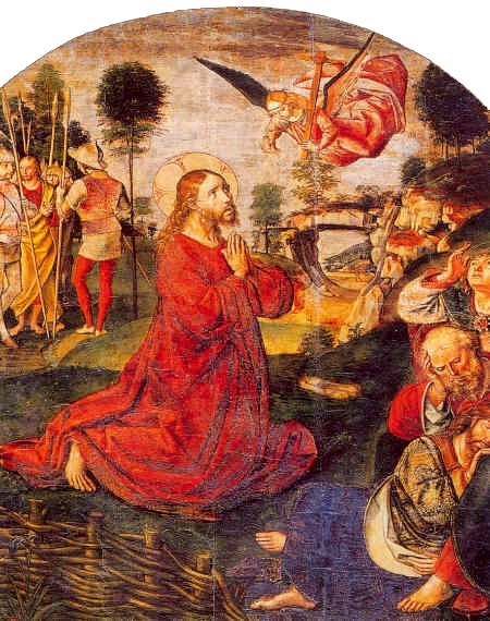 Jesus in the Garden of Gethsemanelabel QS:Len,"Jesus in the Garden of Gethsemane"label QS:Lmk,"Детаљ од сликата „Исус се моли во Гетсиманската градина“" detail